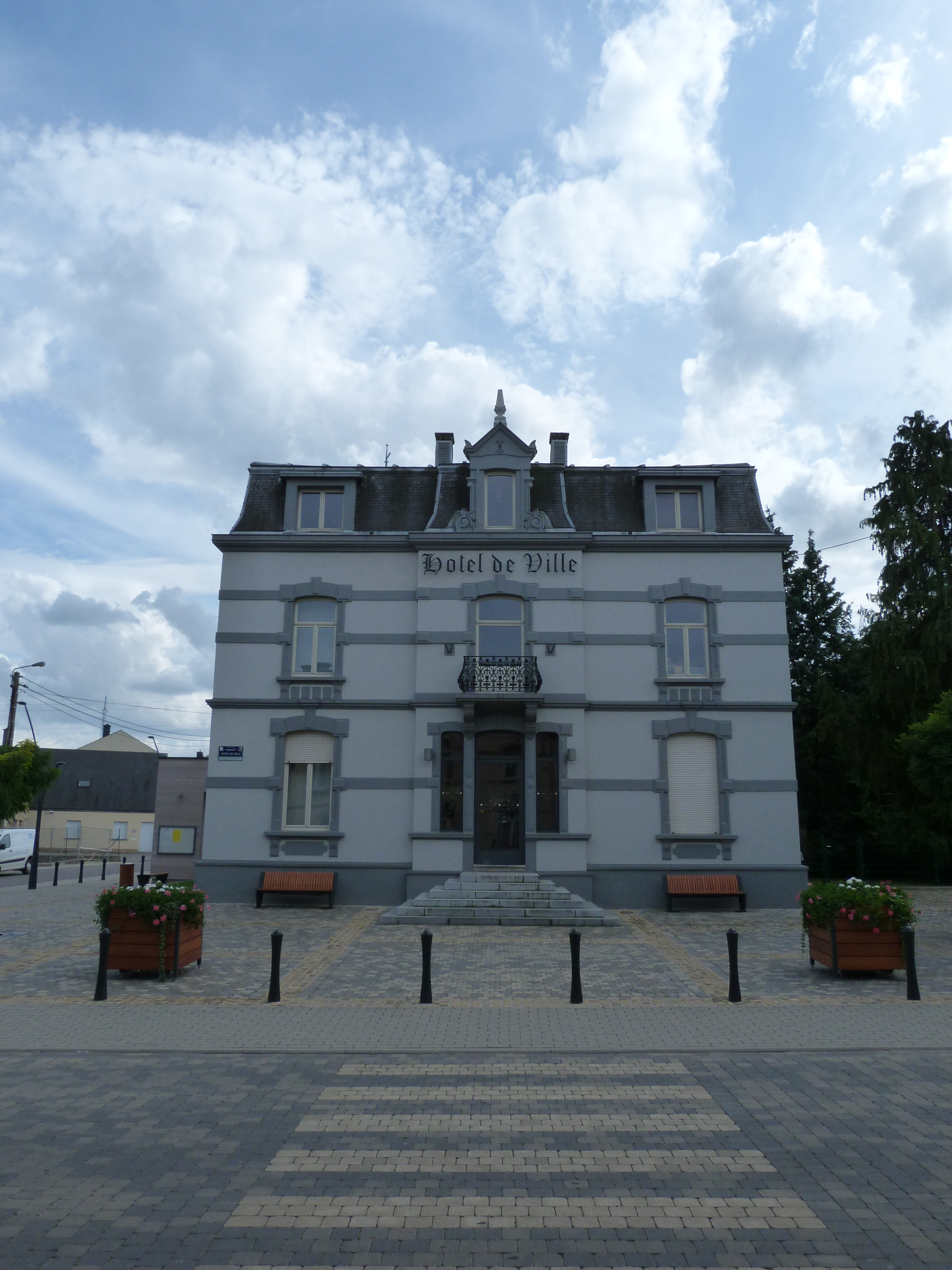 Hotel de ville de la commune d'aubange à Athus (vue de face 2012)